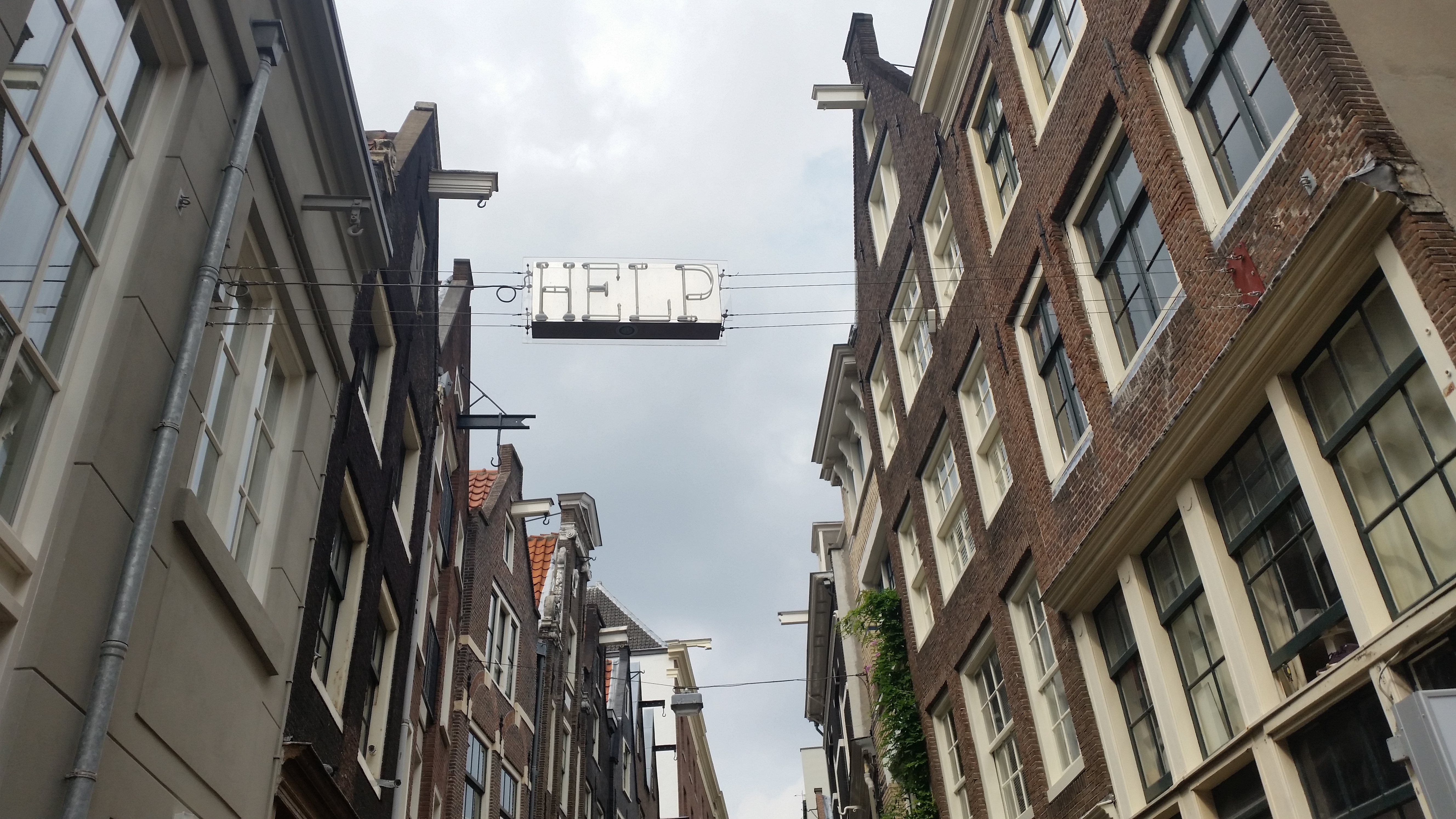 Monument voor Joes Kloppenburg, Voetboogstraat, Amsterdam